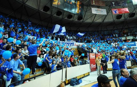 Smogovci Zagreb - finalna utakmica Cibona - Cedevita